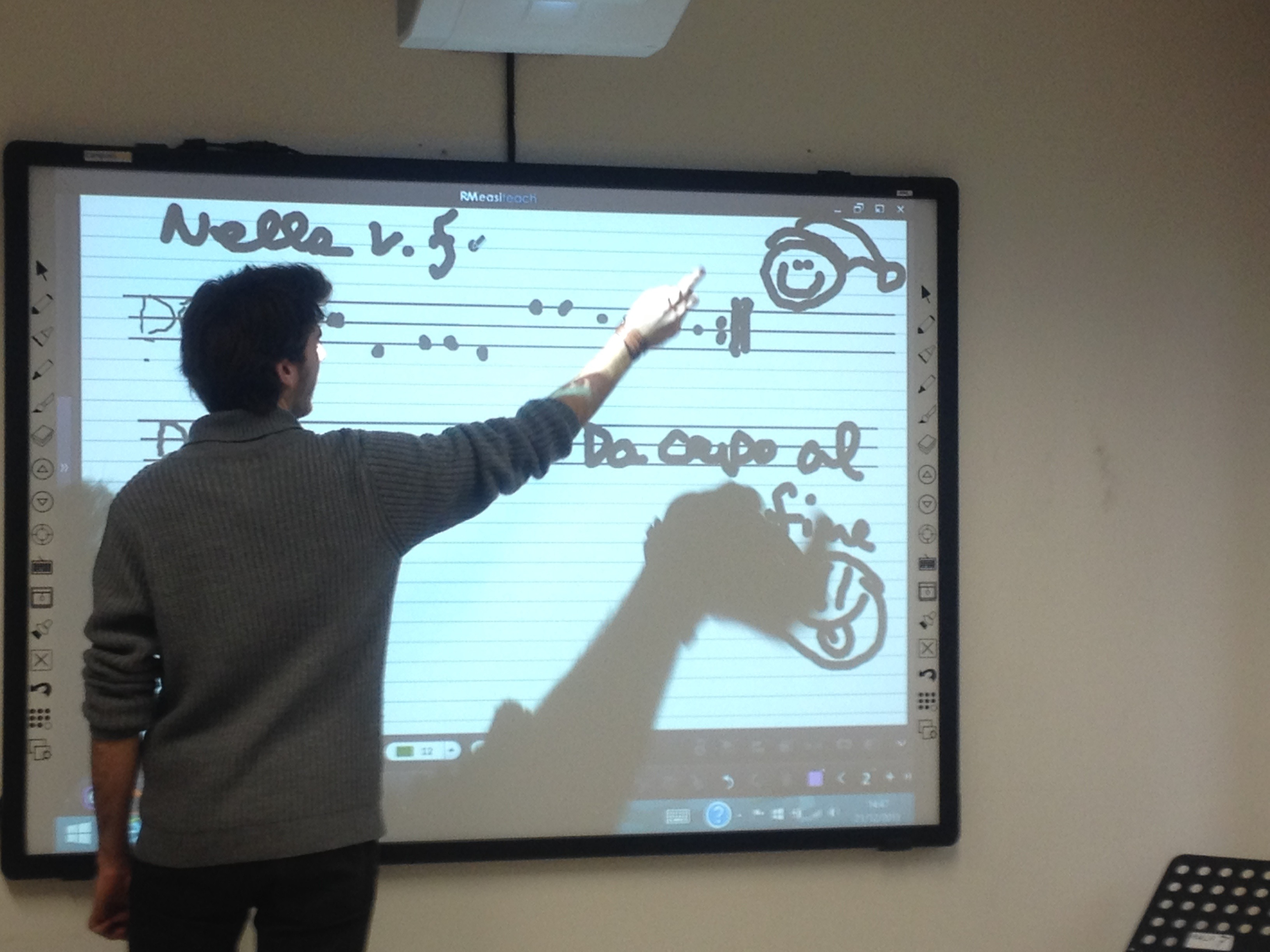 Foto de una clase de música en la cual se utiliza una pizarra interactiva. El estudiante está escribiendo una canción muy popolar a la cual ha juntado un alegre dibujo para felicitarnos navidad.